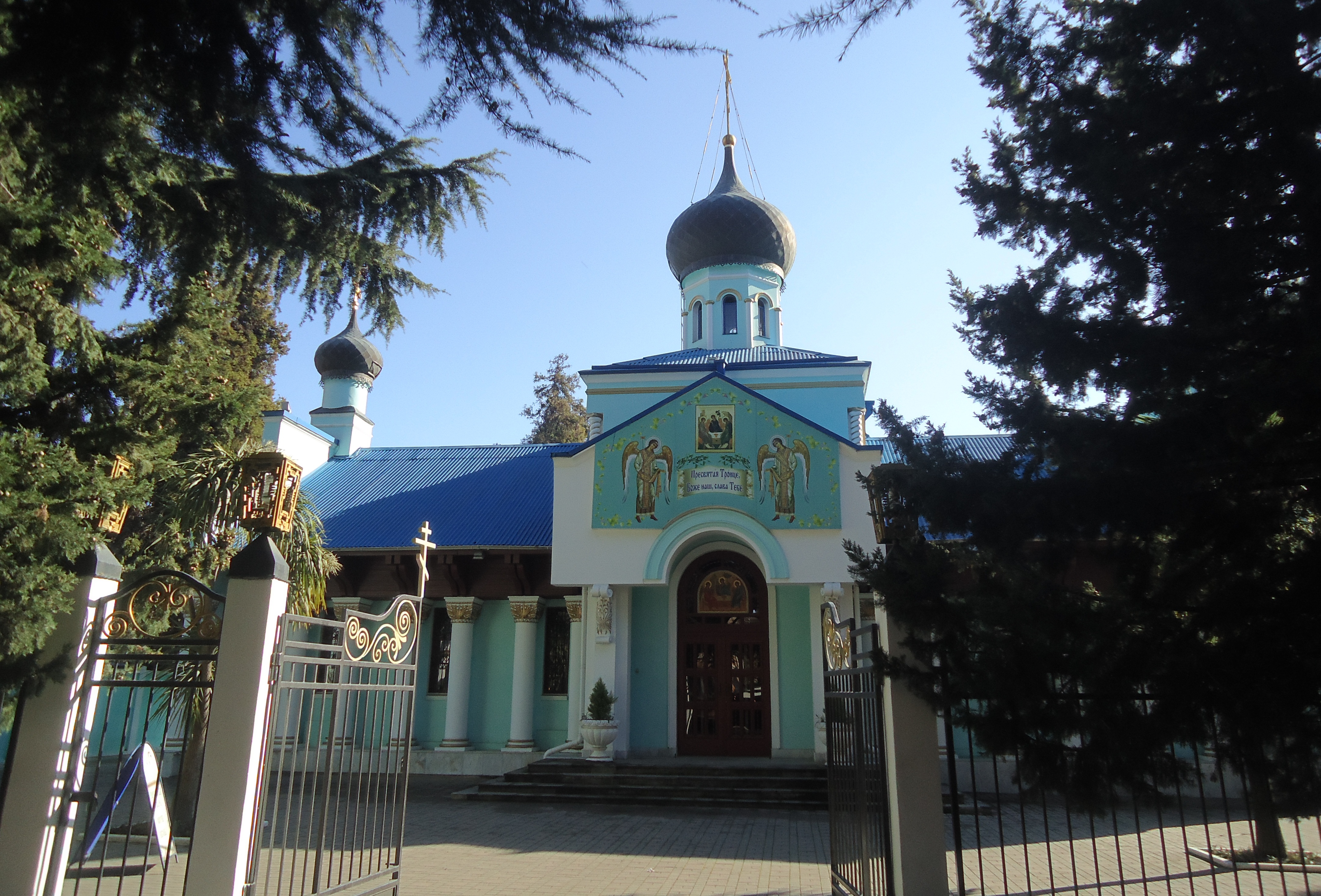 Храм Живоначальной Троицы в Адлере